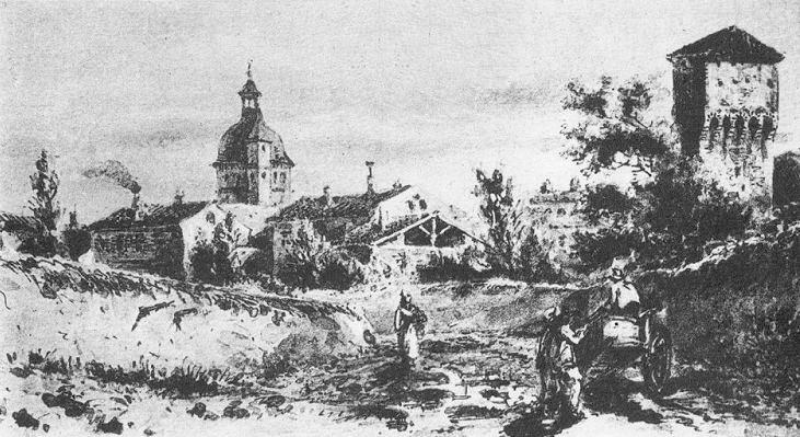 La tour et la maison du bourreau de Toulouse, près de la Porte de Las Croses (dessein de Ferdinand Mazzoli, de 1885, à propos du vieux Toulouse - lithographie d'après un autre dessein de Jules Boilly, à l'époque l'époque de la Restauration, vers 1815).